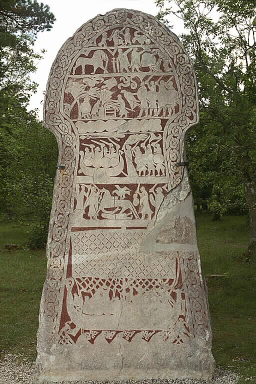 Motiv: Bildsten Bunge 77:2a Kategori: Bildristning . Bildsten Bunge 77:2a.